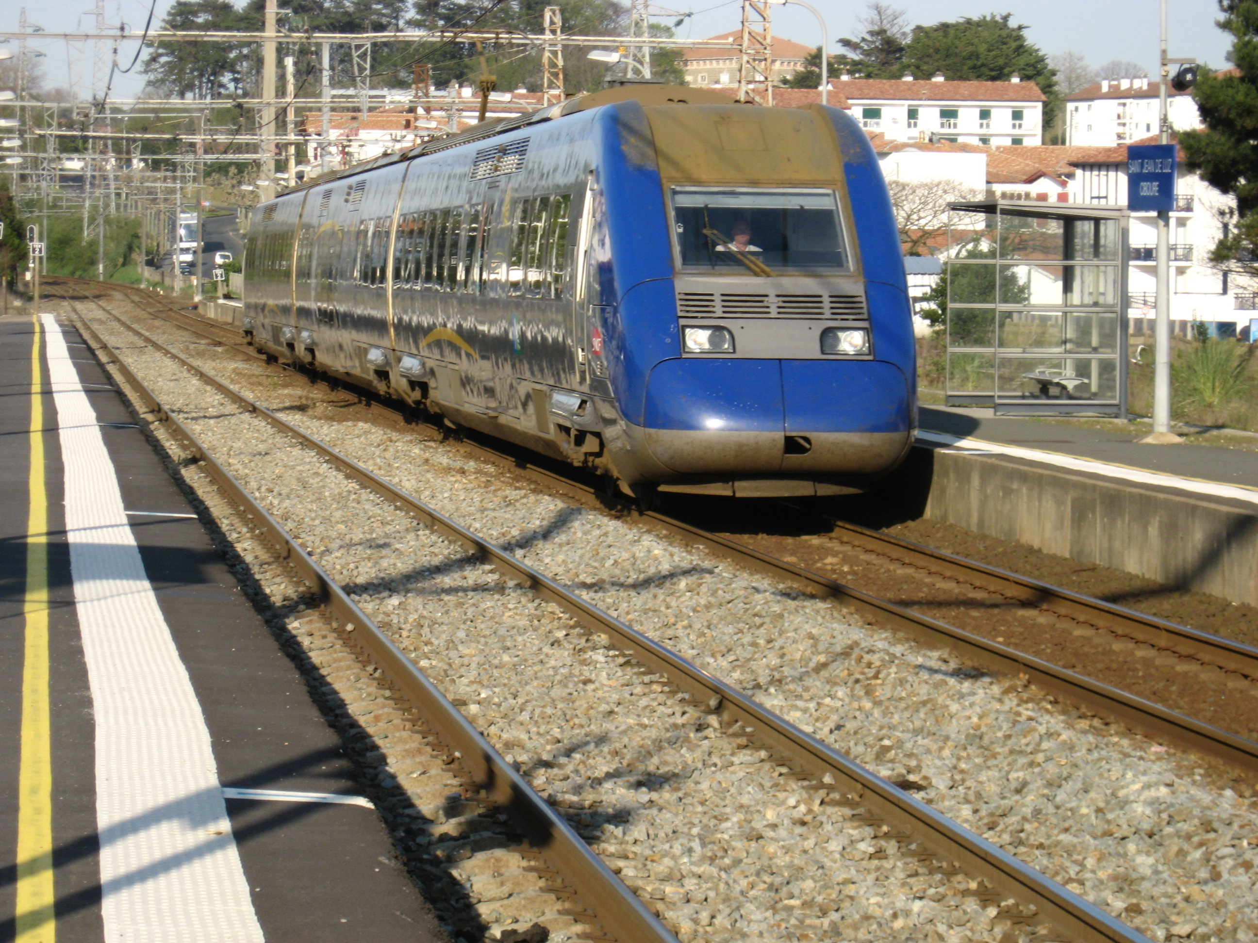 TER trein in St Jean de Luz